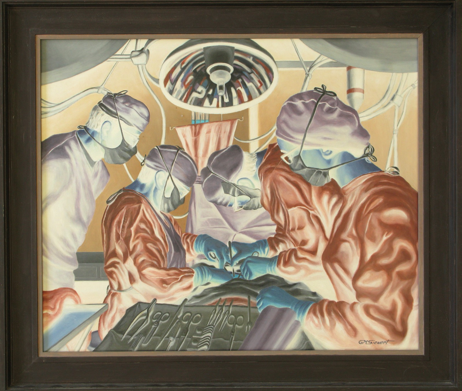 G.M. Siewert, Ölbild, Ärzte im Operationssaal